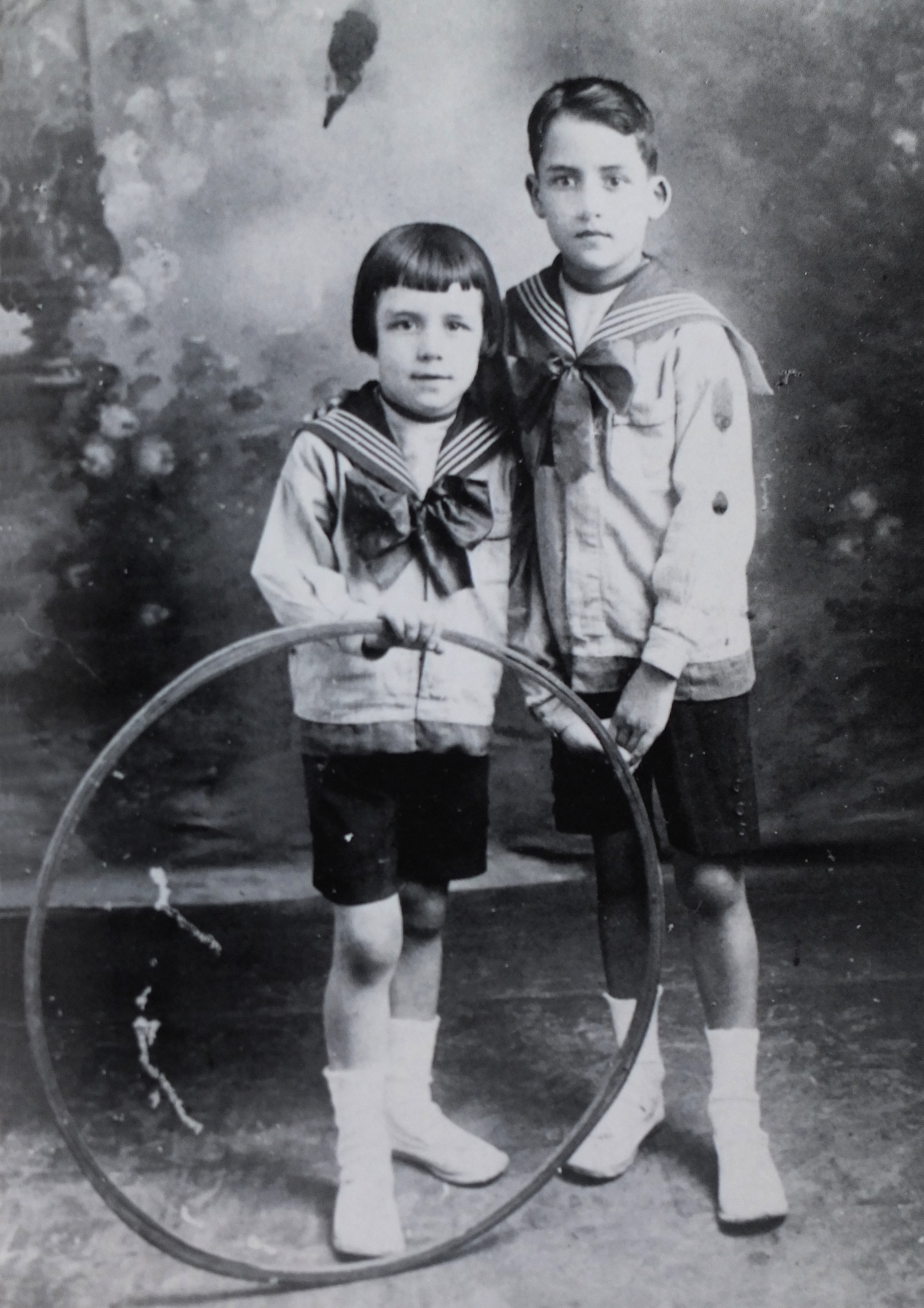 Vers 1920, Albert Camus et son frère ainé Lucien. Photographe inconnu. Coll. C. et J. Camus, Fds A. Camus, Bibliothèque Méjanes.